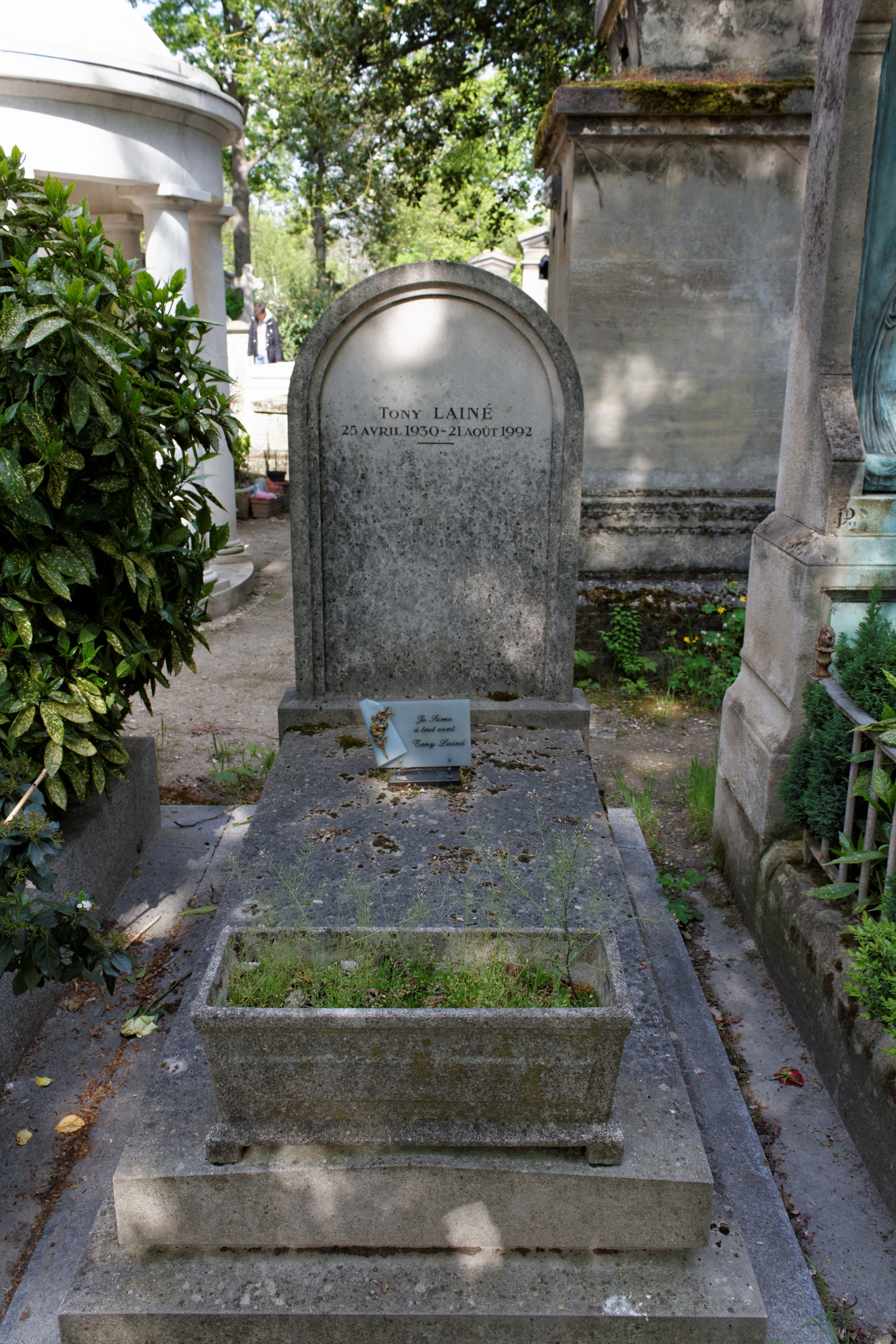 Vue d'ensemble